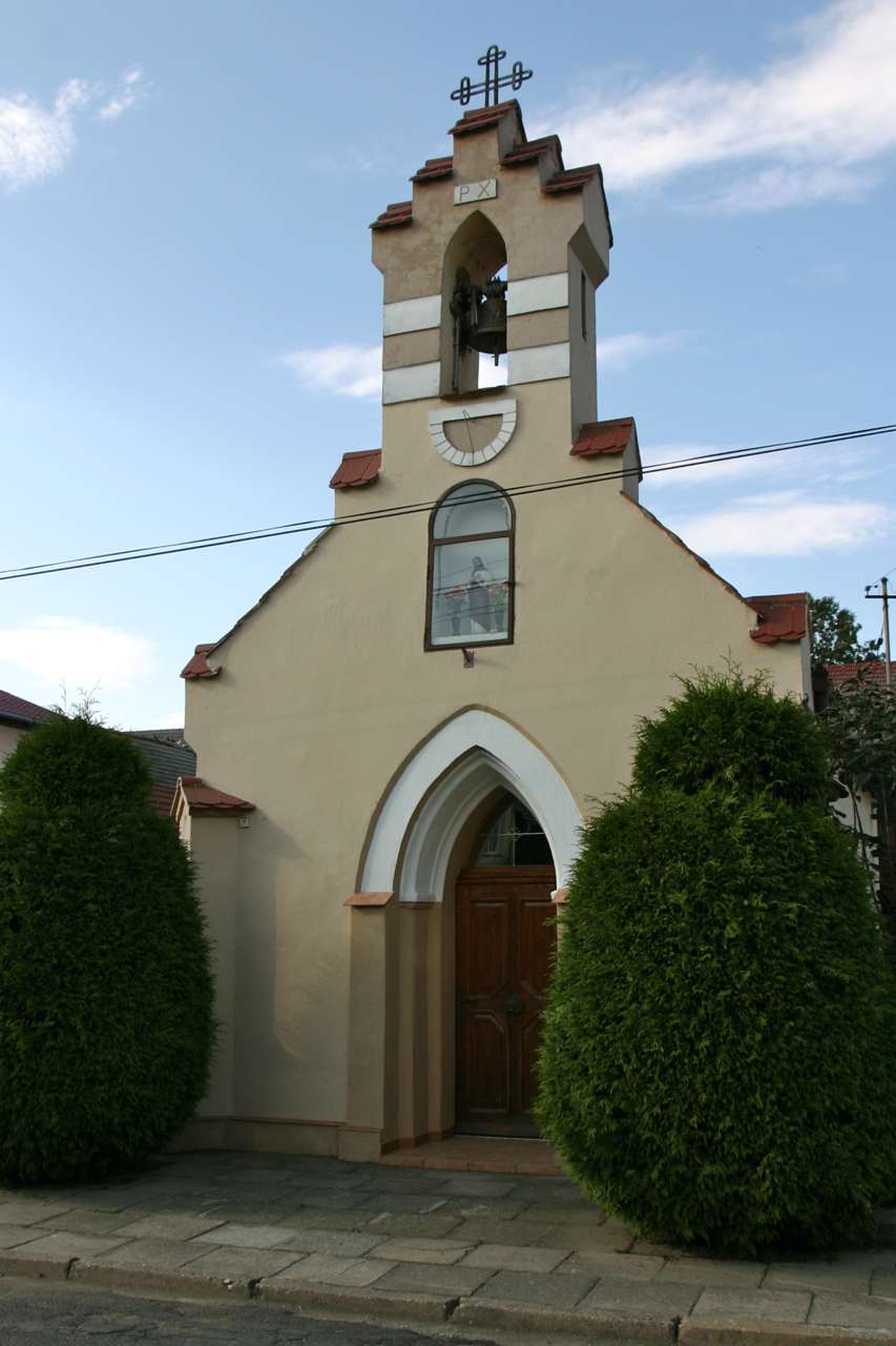 Józefów (dodatkowa nazwa w j. niem. Josefsgrund) – wieś w Polsce położona w województwie opolskim, w powiecie prudnickim, w gminie Biała.